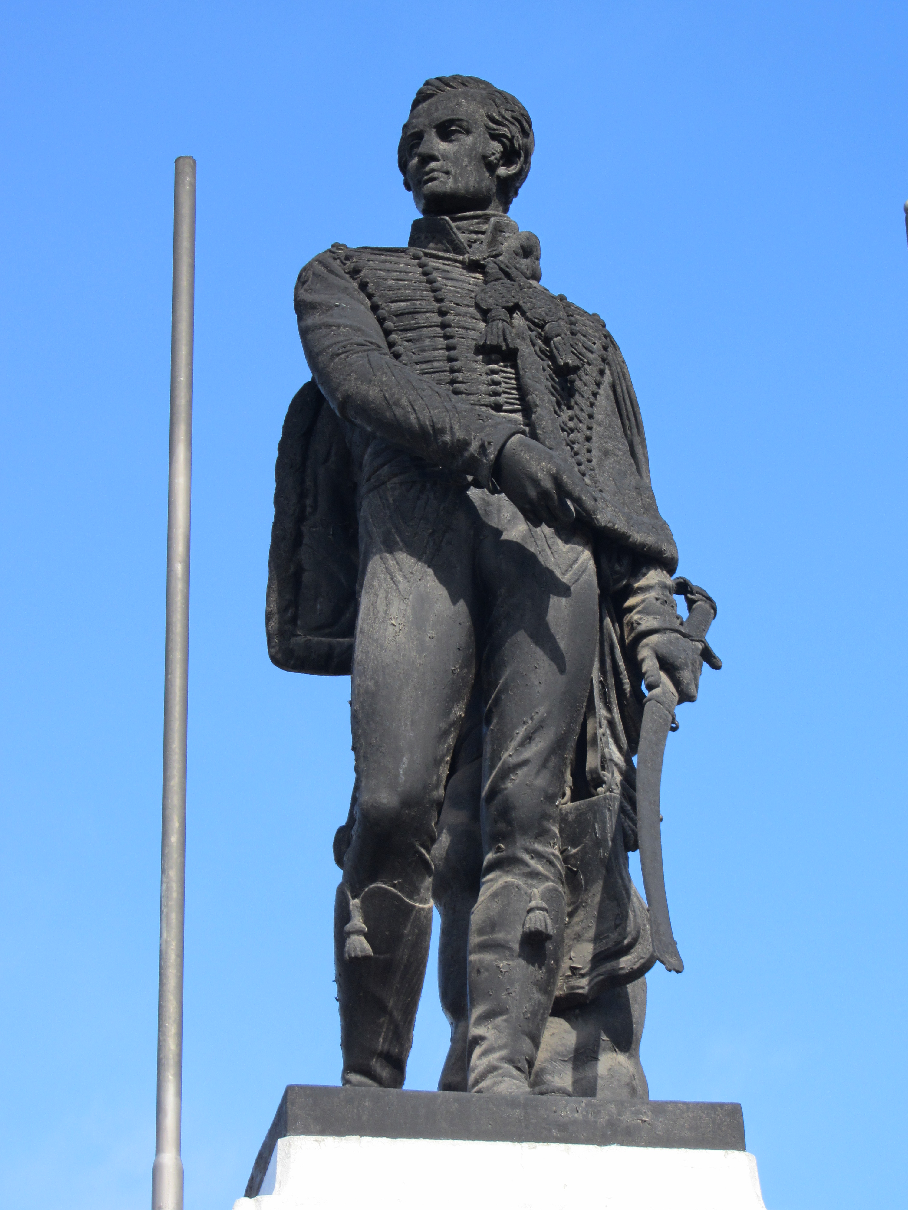 Estatua de José Miguel Carrera, obra del escultor francés Auguste Dumont